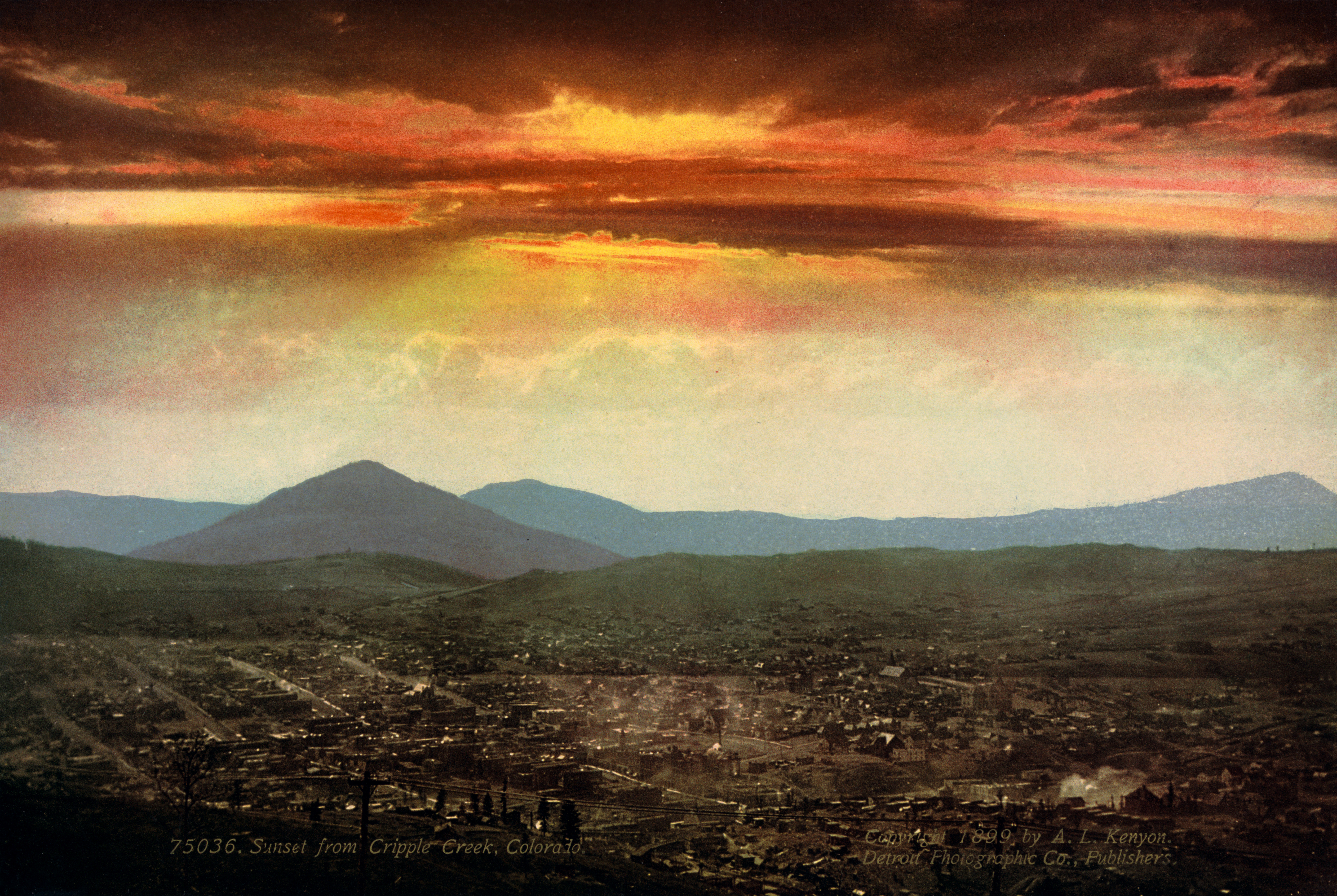 75036. Sunset from Cripple Creek.